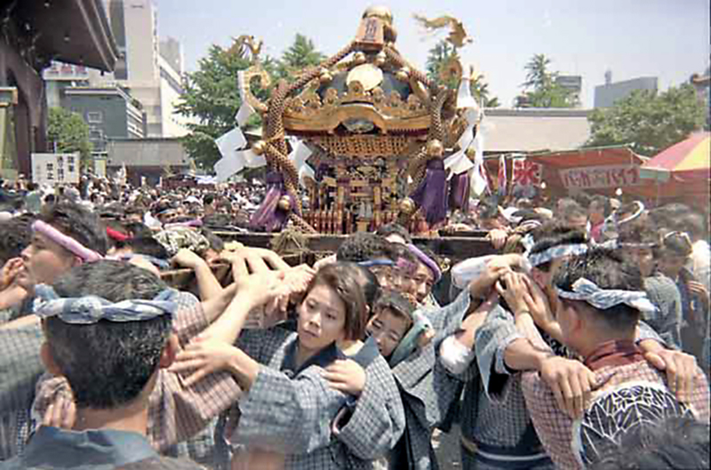 Asakusa Sanja Festival Matsuri Shinto Shrine Mikoshi Tokyo Japan